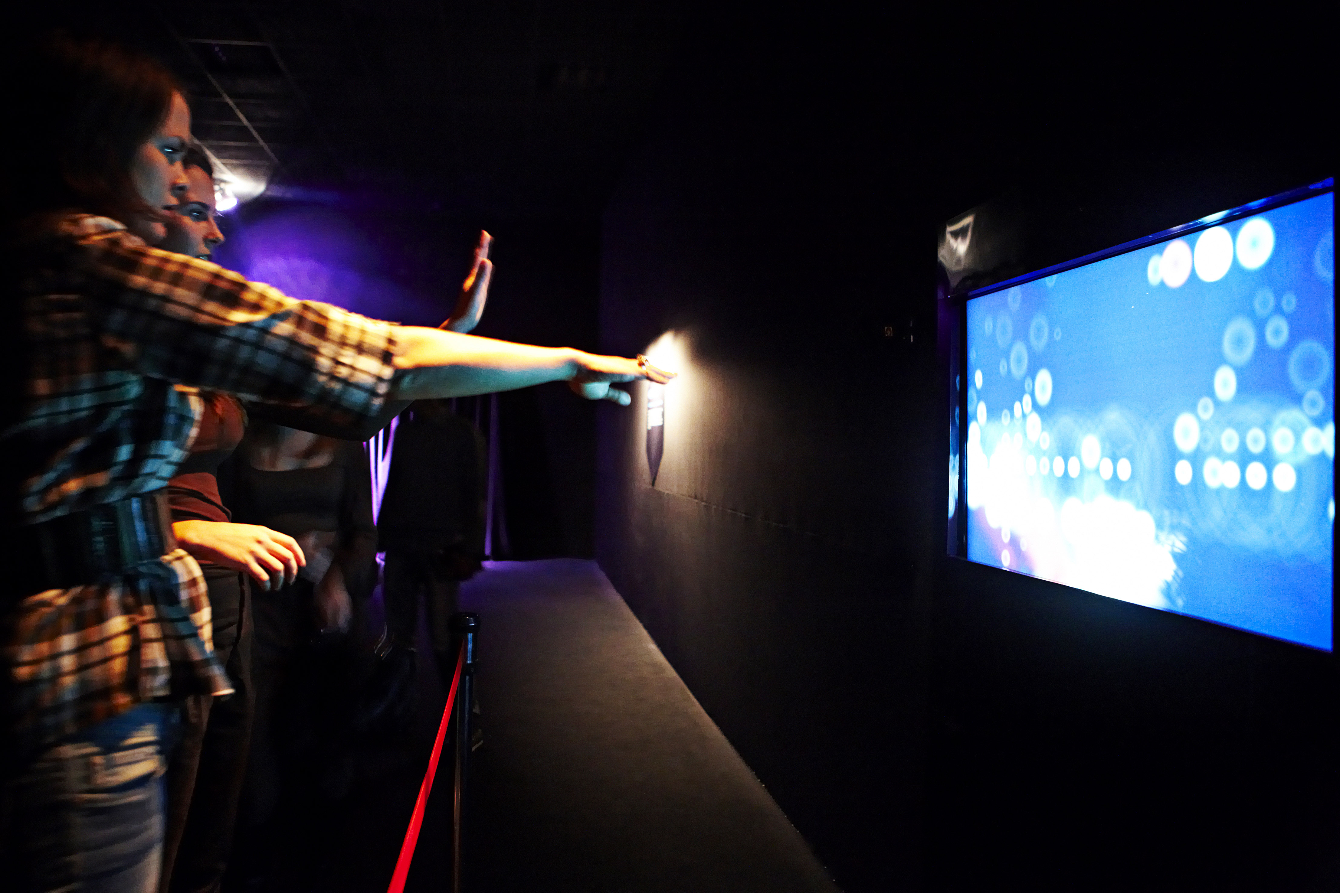 Фестиваль Yota Space 2010 - MSA Visuals - инсталляция Webcam Piano